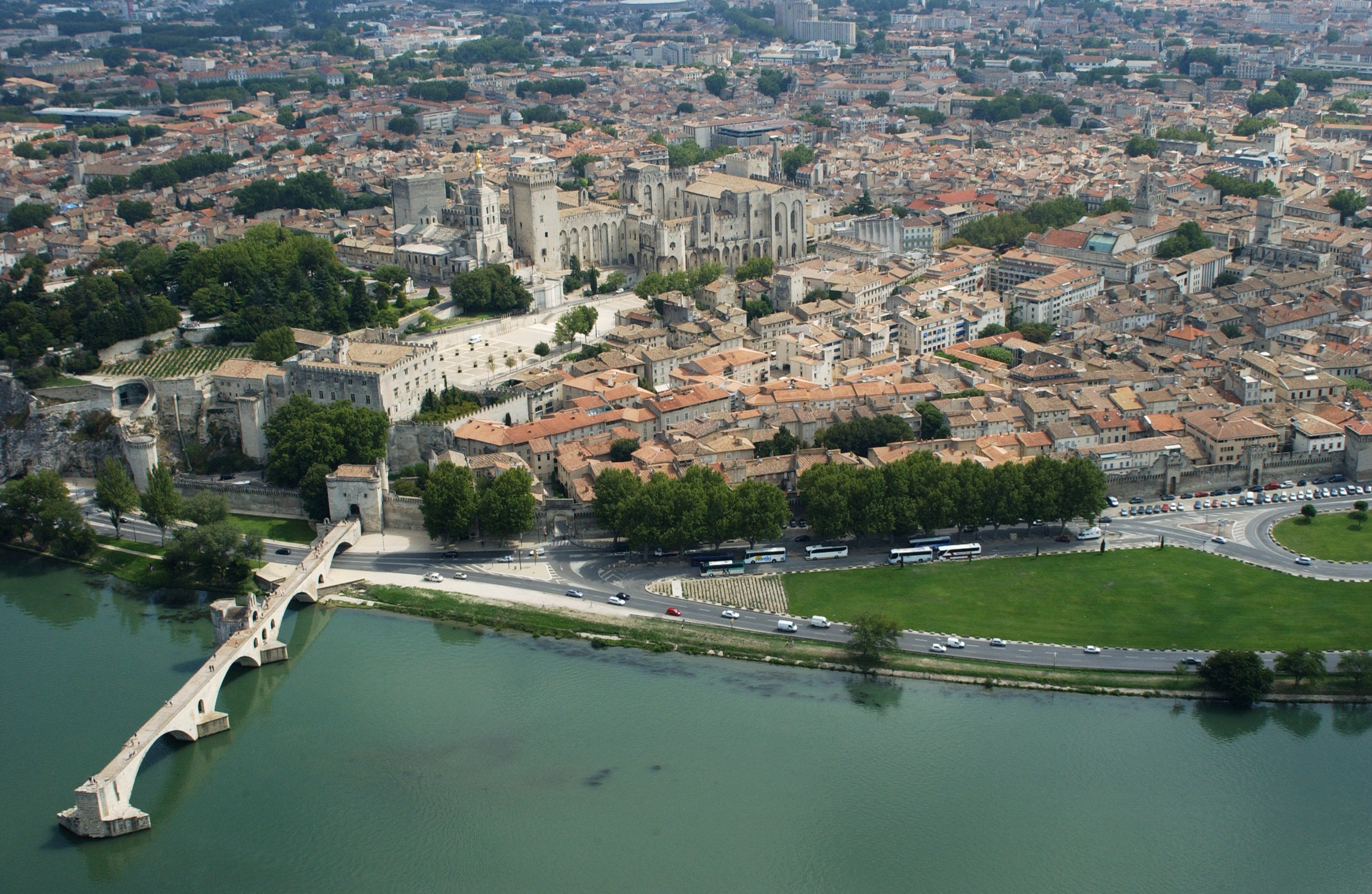 Vue aérienne Avignon